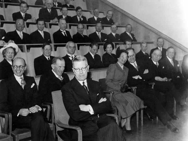 Kung Gustaf VI Adolf vid invigningen av Fysiska institutionen 1951. Till höger statminister Tage Erlander med fru Aina (tidigare fysikstudenter i Lund).